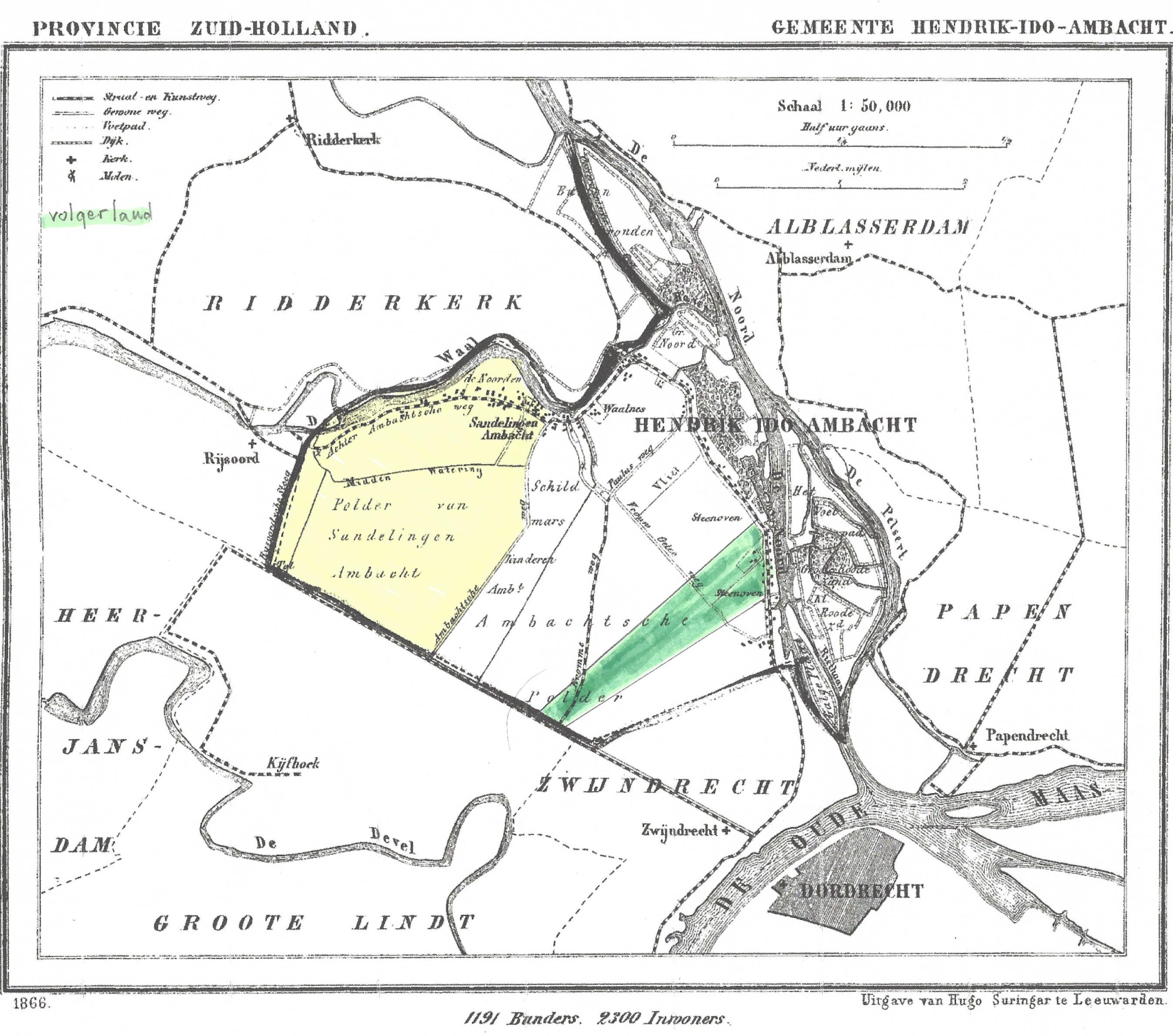 Sandelingenambacht 1866